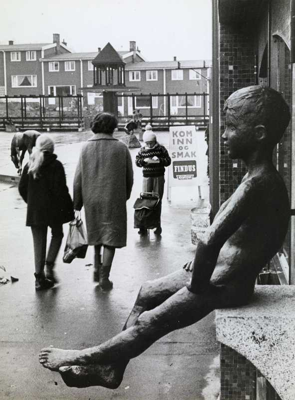 Veitvet senter. Foto: Johan Brun / Oslo Museum